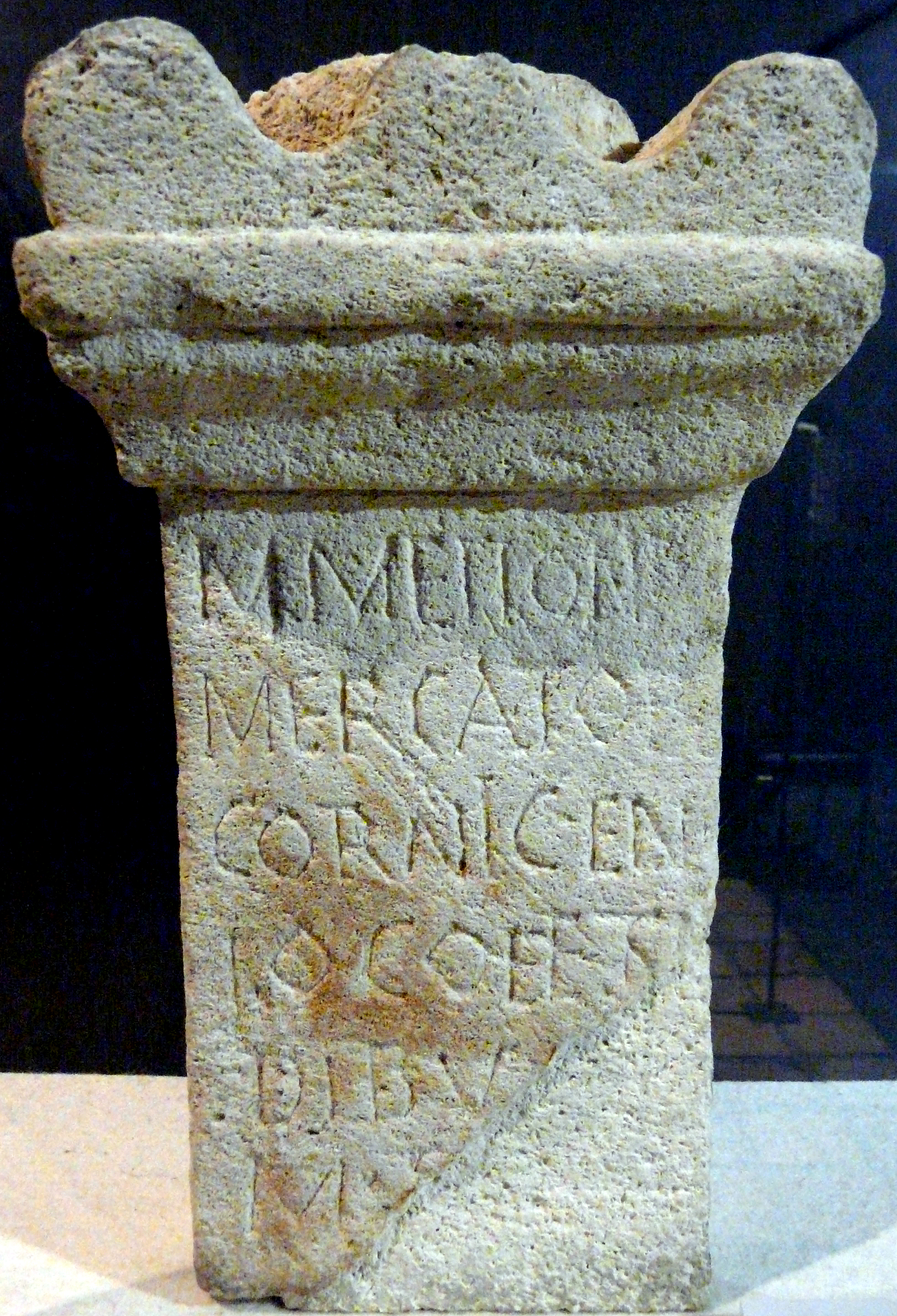 Weihestein (Ness-Lieb 00243) des Cornicen Marcus Mellonius Mercator, aus Novaesium; Clemens-Sels-Museum, Neuss; Inschrift: M(arcus) Melloniu[s] / Mercator / cornicen / loco test(amento) / dibu[s] / M(anibus?) s[acr(ato?)